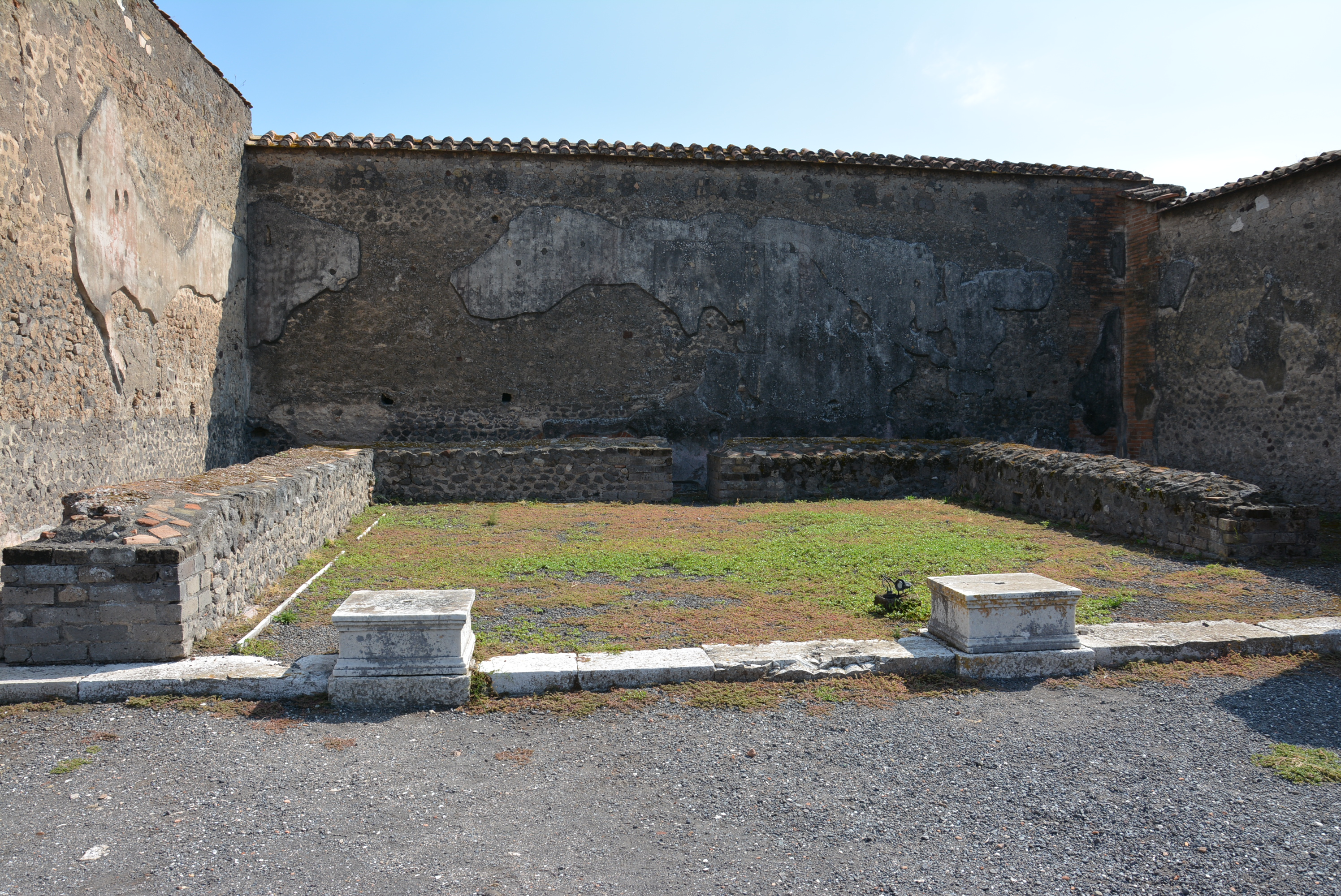 Ingresso secondario - MIBACT This is a photo of a monument which is part of cultural heritage of Italy.